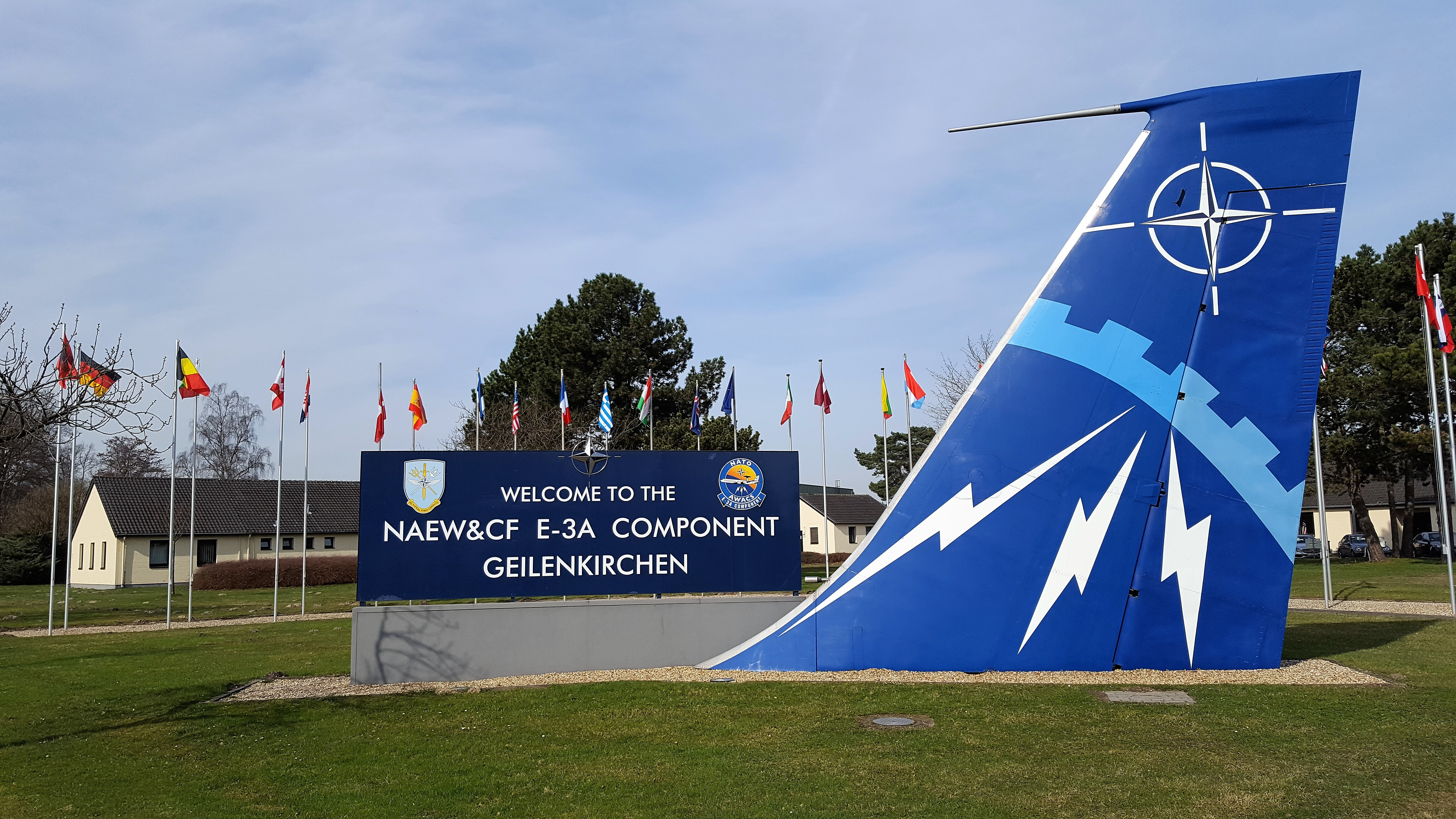 Luftwaffenbasis Geilenkirchen